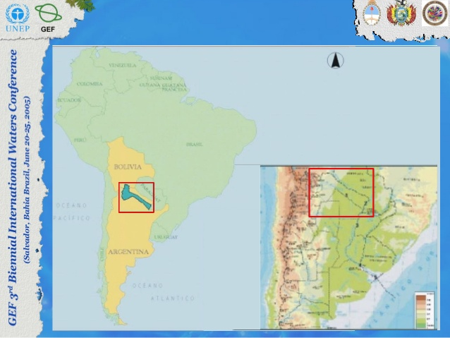 Bermejo river